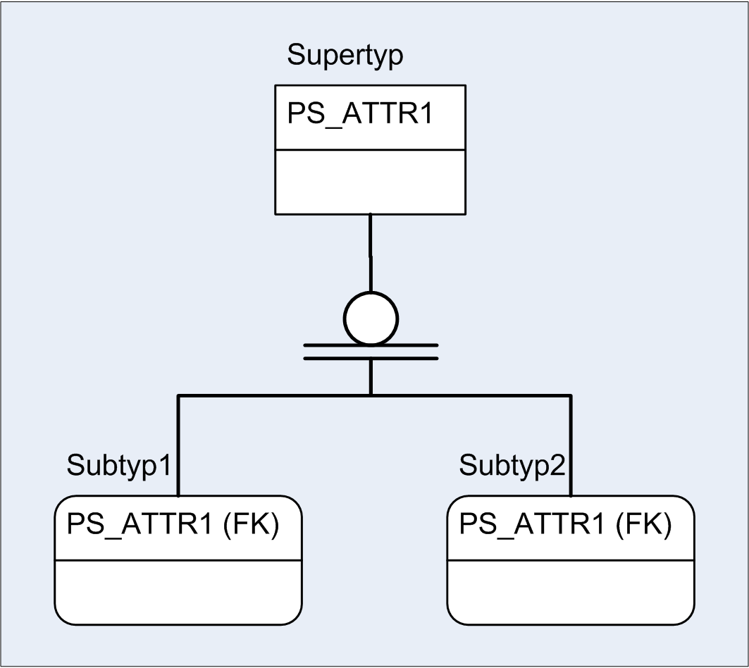 Vererbungsdarstellung in IDEF1X